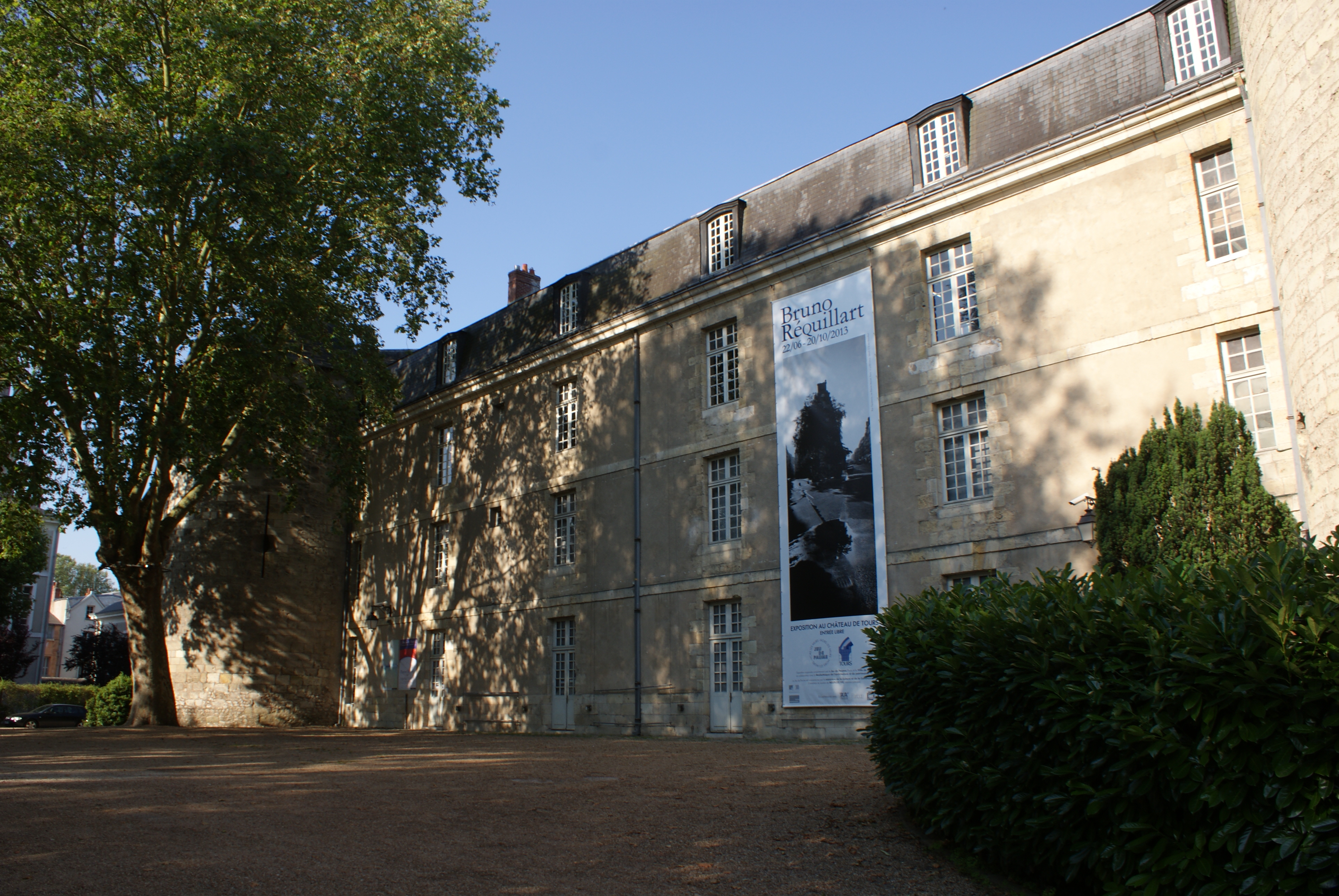 Exposition au château de Tours en juillet 2013